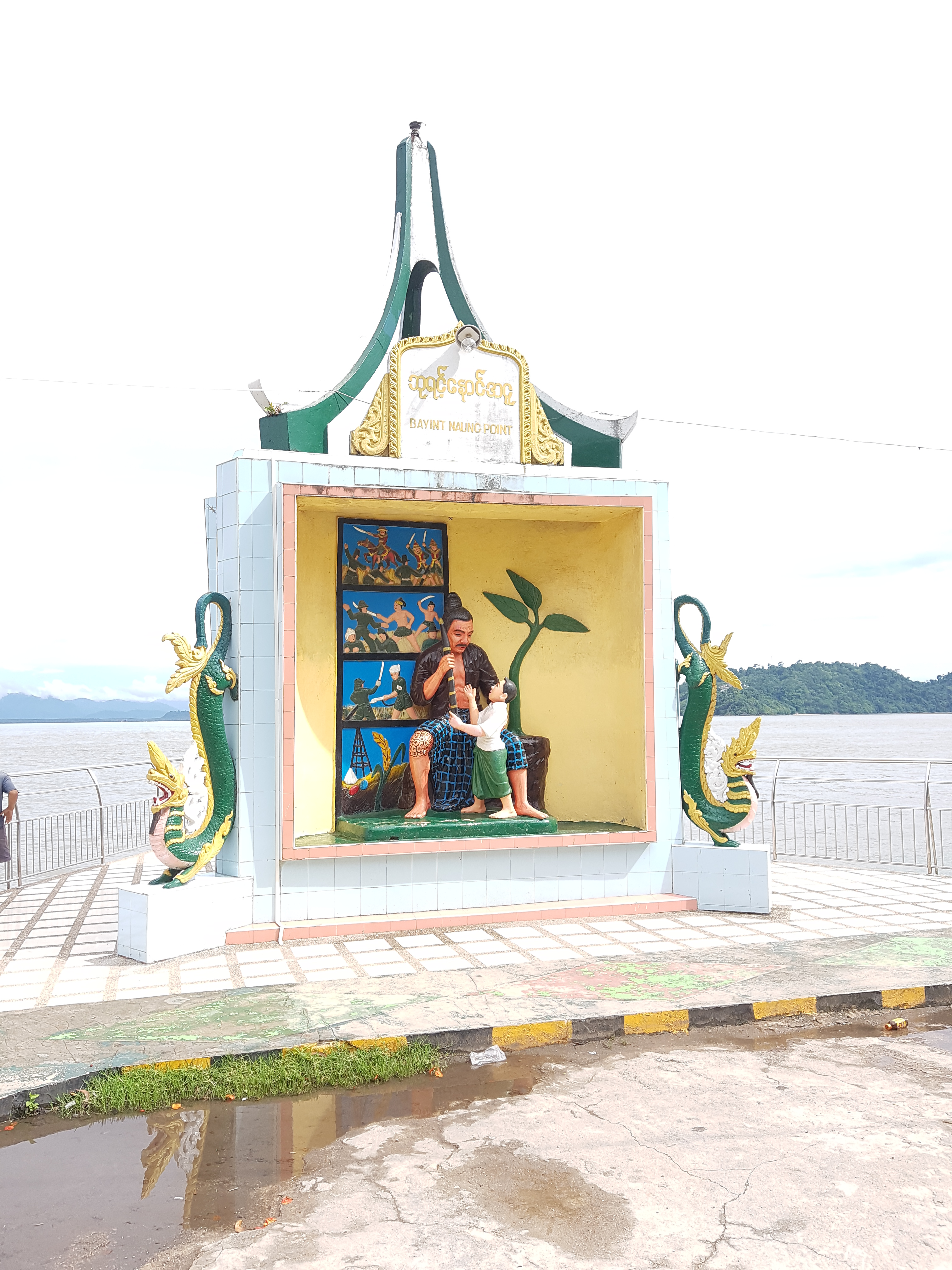 ဘုရင်​နောင်အငူ